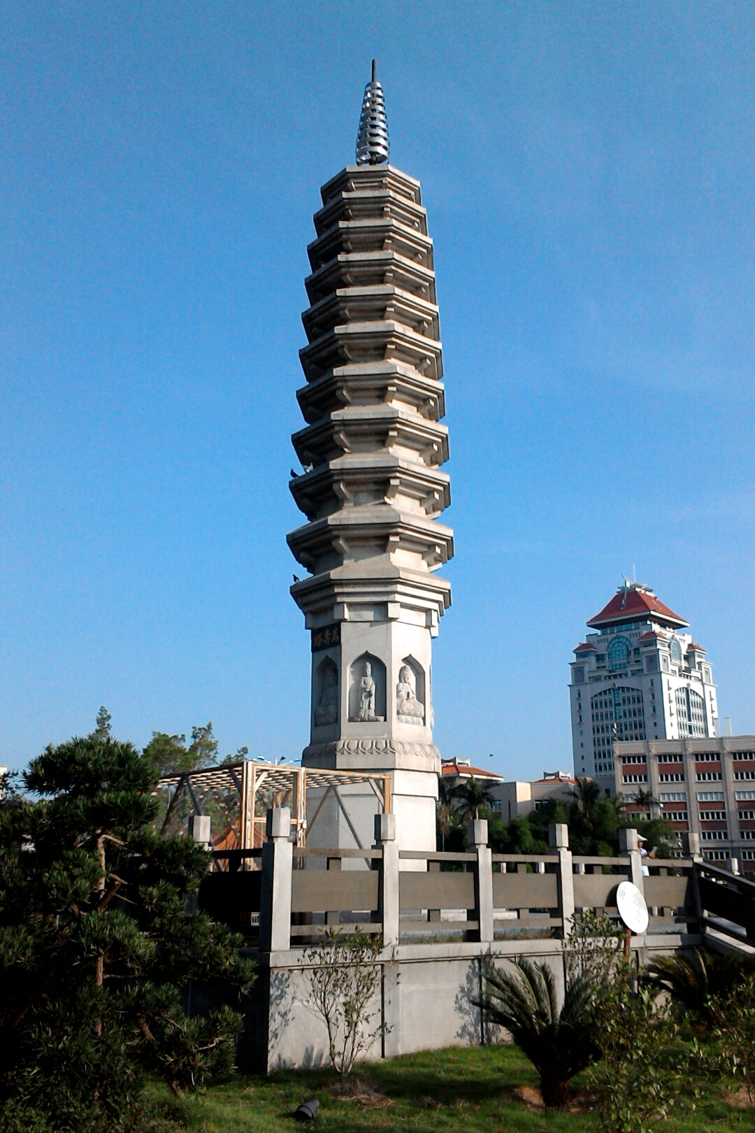 中文（台灣）: 南普陀寺萬壽塔 ，福建省廈門市思明區濱海街道演武社區